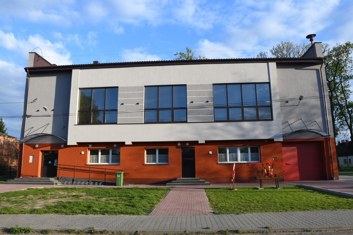 Sala OSP Chotów 2019 r.